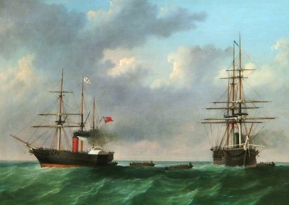 L'USS San Jacinto, appartenant à la flotte des États-Unis, fait stopper le HMS Trent, un navire courrier britannique transportant à son bord deux envoyés de la Confédération. En violation des lois internationales, les diplomates et leur famille sont arrêtés et transférés à bord du San Jacinto pour être ramenés en territoire américain. L'incident provoque une crise très grave entre les États-Unis et la Grande-Bretagne et le président Lincoln doit faire relâcher les émissaires afin d'éviter une déclaration de guerre.